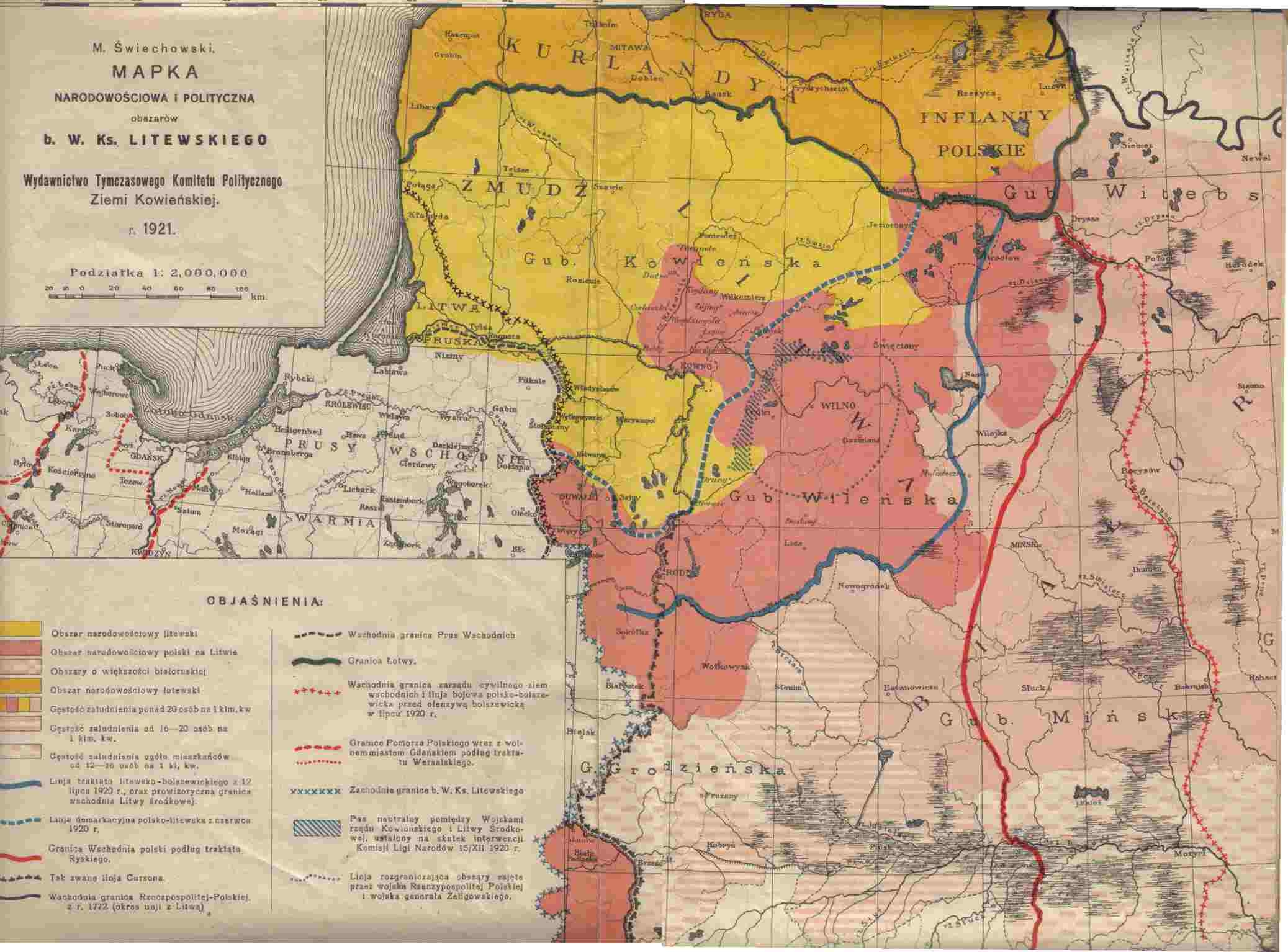 Mapka narodowościowa i polityczna zachodniej części b. WKL z 1921 r.